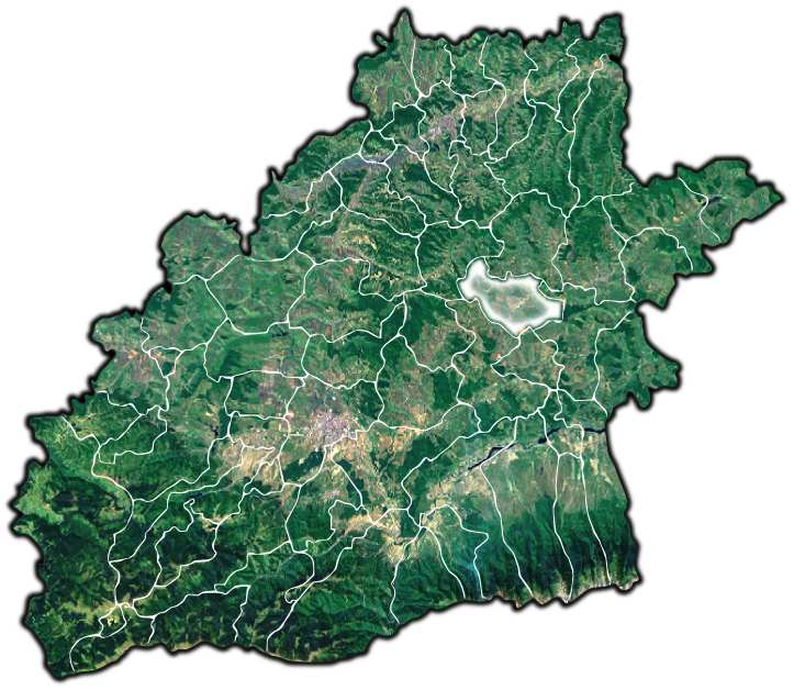 Altina jud Sibiu.